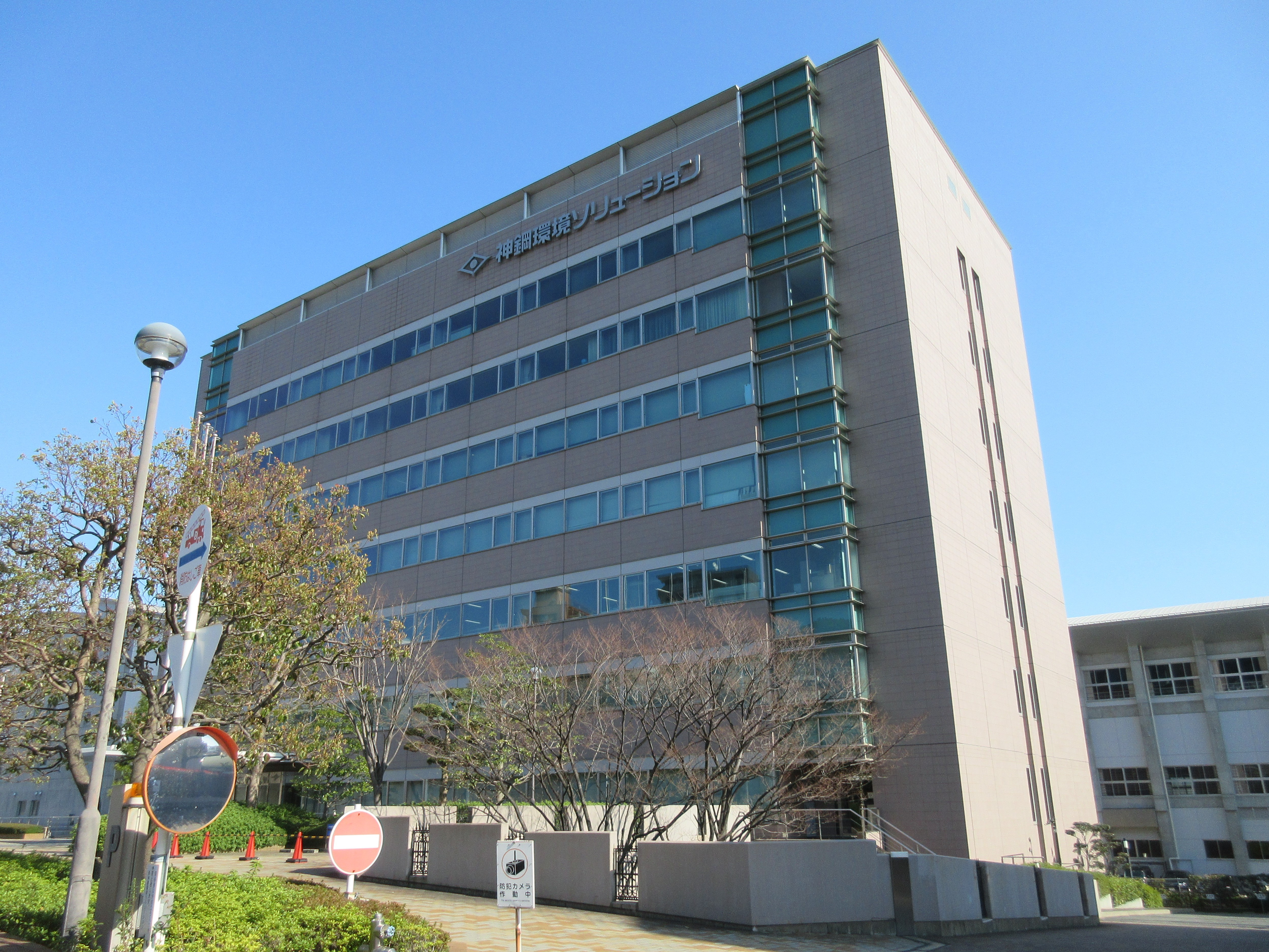 神鋼環境ソリューション本社